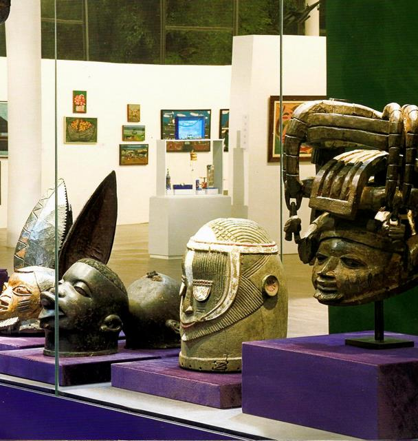 Vitrine com máscaras africanas no Museu Afro-Brasil